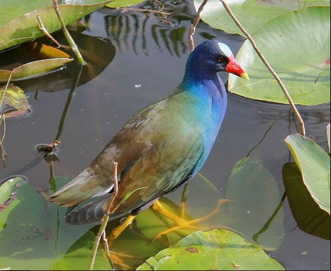 Ave llanera, se encuentra en lagunas y esteros apureños.